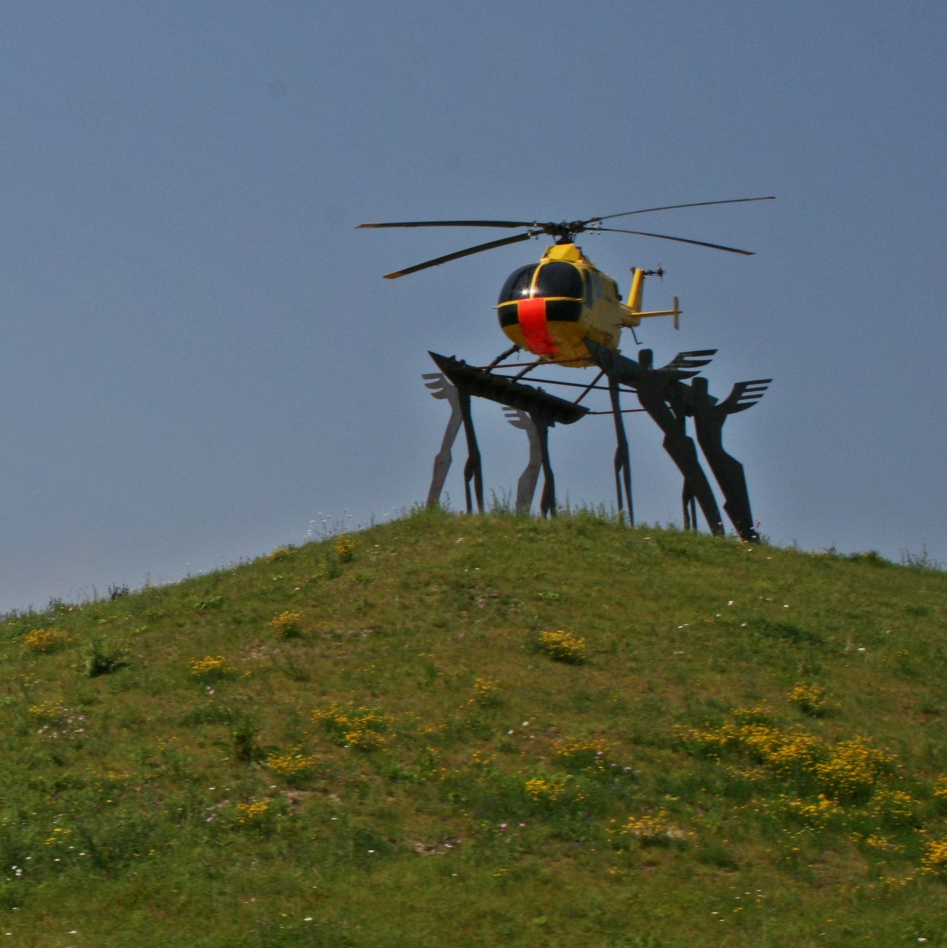 Denkmal Rettungshubschrauber des ADAC am Kamener Kreuz, Sockel erstellt vom Lüdinghausener Künstler Alfred Gockel